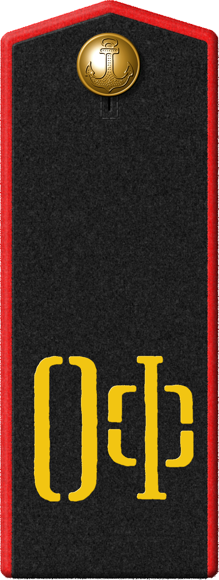 Союз Советских Социалистических Республик/Советский Союз/СССР Вооруженные силы Военно-морской флот Соединение: Онежская военная флотилия Род войск/службы: Береговая служба Знаки различия образца 1943г., погоны к шинели и бушлату. Воинское звание: Краснофлотец. Первичные источники: Указ Президиума Верховного Совета СССР от 15 февраля 1943 года «О введении новых знаков различия для личного состава Военно-Морского Флота СССР» Приказ Народного комиссара ВМФ СССР от 15 февраля 1943 года №51 "О введении новых знаках различия для личного состава ВМФ". "Иллюстрированное описание знаков различия личного состава ВМФ СССР", утвержденное Народным комиссаром ВМФ СССР 5 мая 1943 года.